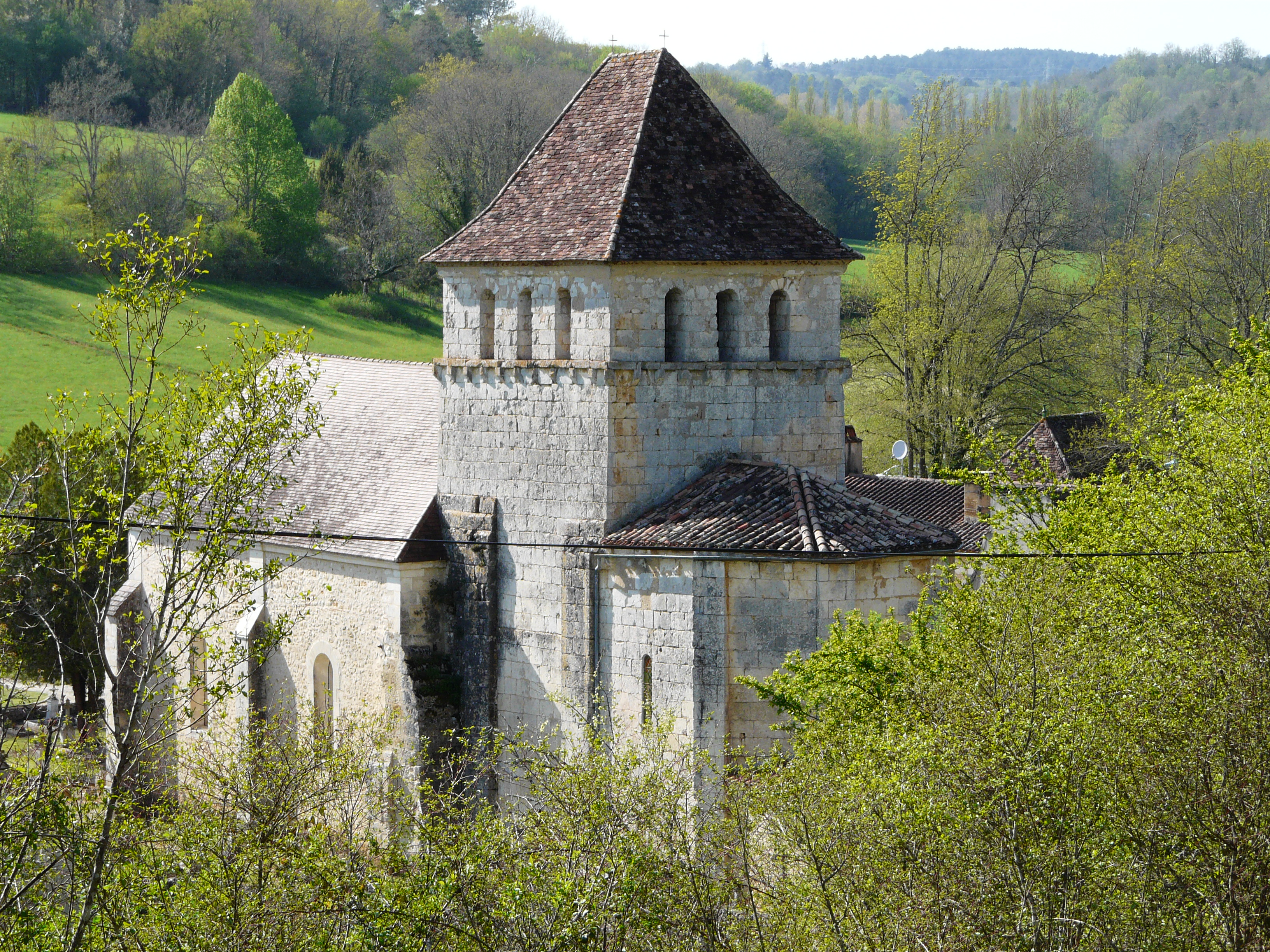 L'église Saint-Pierre-ès-Liens vue depuis le sud-est, Queyssac, Dordogne, France.